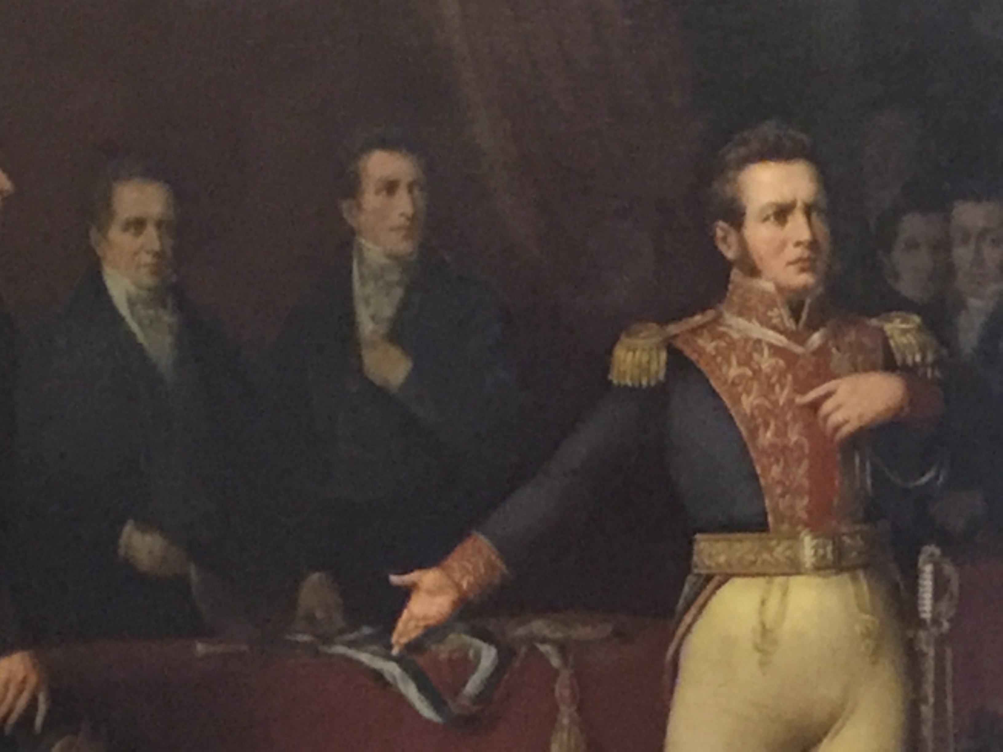 La Abdicación de Bernardo O´Higgins. 28 de enero de 1823 En medio de la inquietud y descontento creciente de los vecinos de la capital se cita a un Cabildo Abierto para el 28 de enero de 1823, en el Tribunal de Consulado, (Ubicado en el lugar donde se encuentra el actual Palacio de Justicia, Compañía esquina Bandera, vereda sur, demolido el año 1906 para la construcción del actual edificio). En esta reunión se le pidió a O´Higgins que abandonase su cargo como medio de evitar la guerra civil que se anunciaba ya por los rencores y conflictos acumulados. Aquí aparecen de Izquierda a derecha: Agustín Eyzaquirre, Fenando Errázuriz y Bernardo O´Higgins.